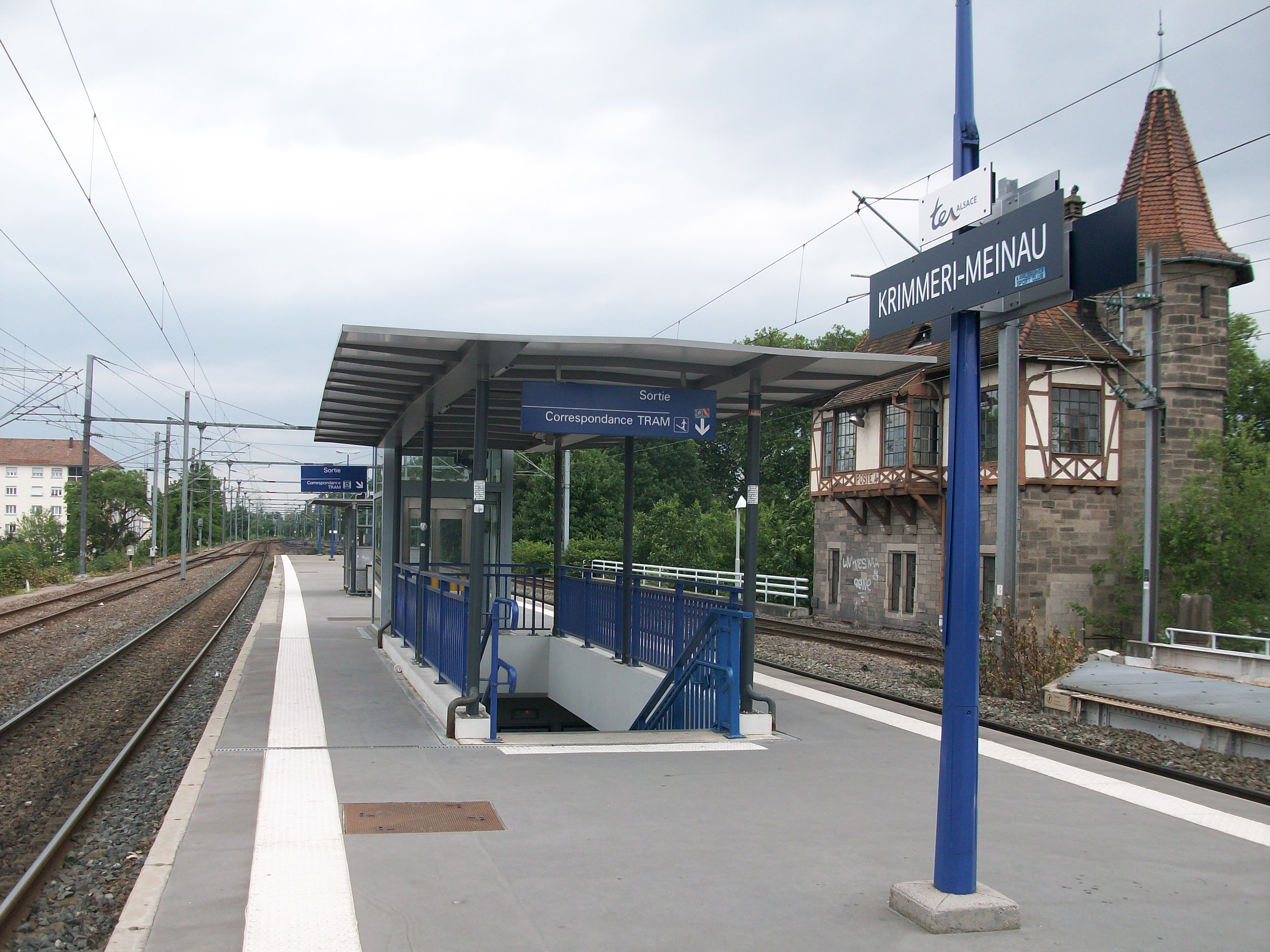 Quai de la station Krimmeri-Meinau